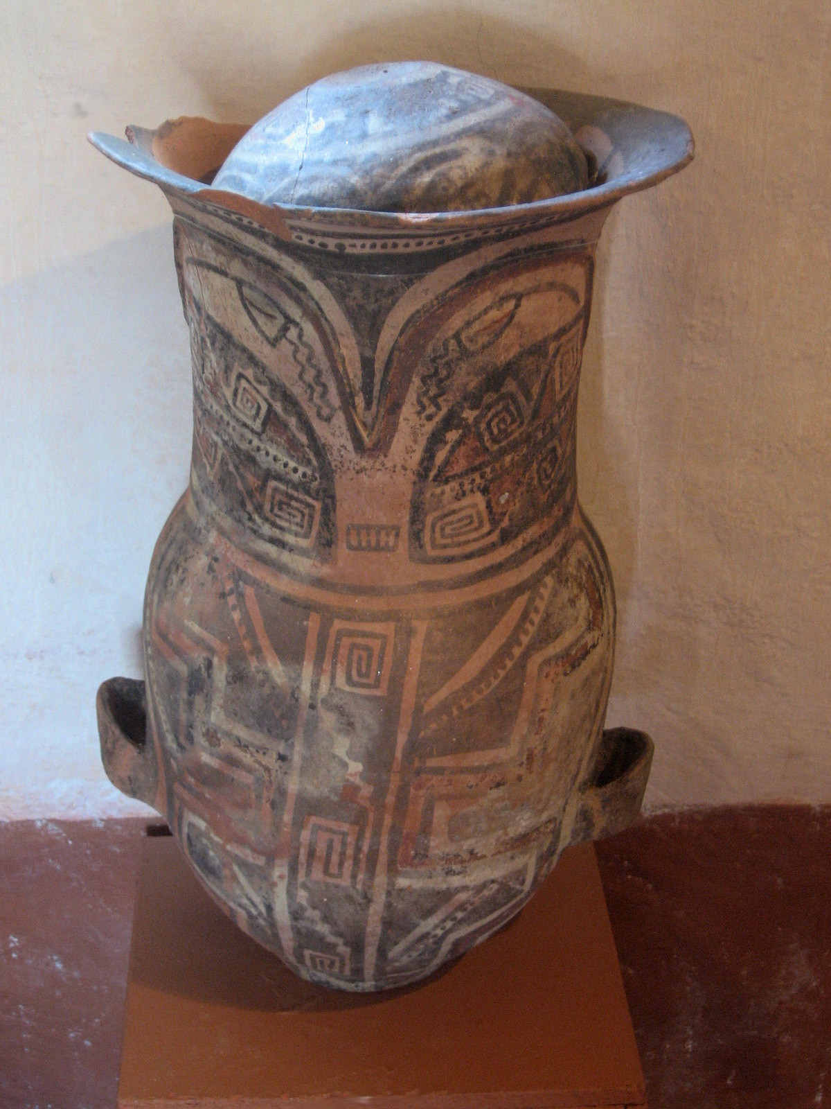 Pieza precolombina en el Museo Jesuítico La Banda - Tafí del Valle - Tucumán - Argentina